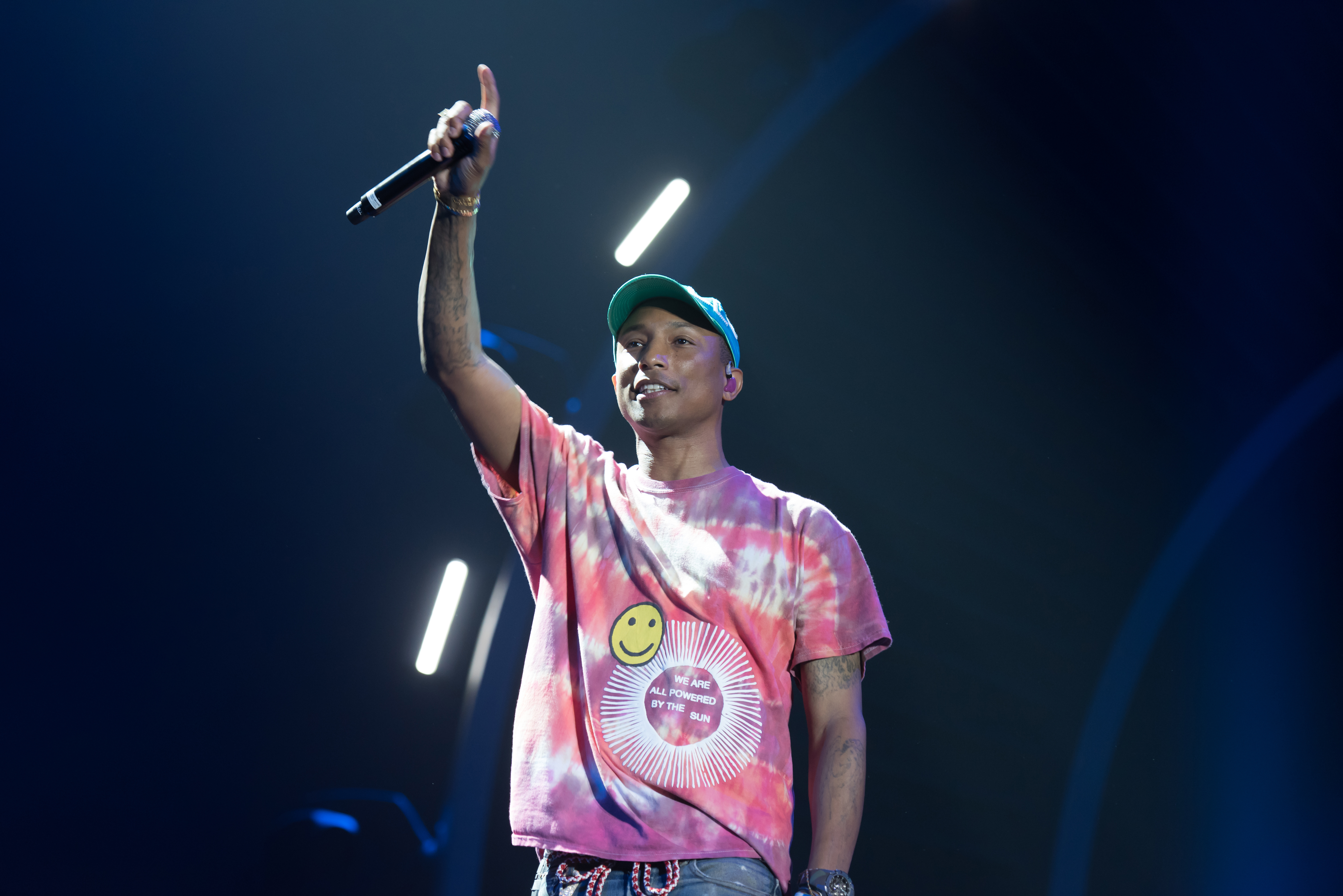 Pharrell Williams beim Global Citizen Festival in Hamburg